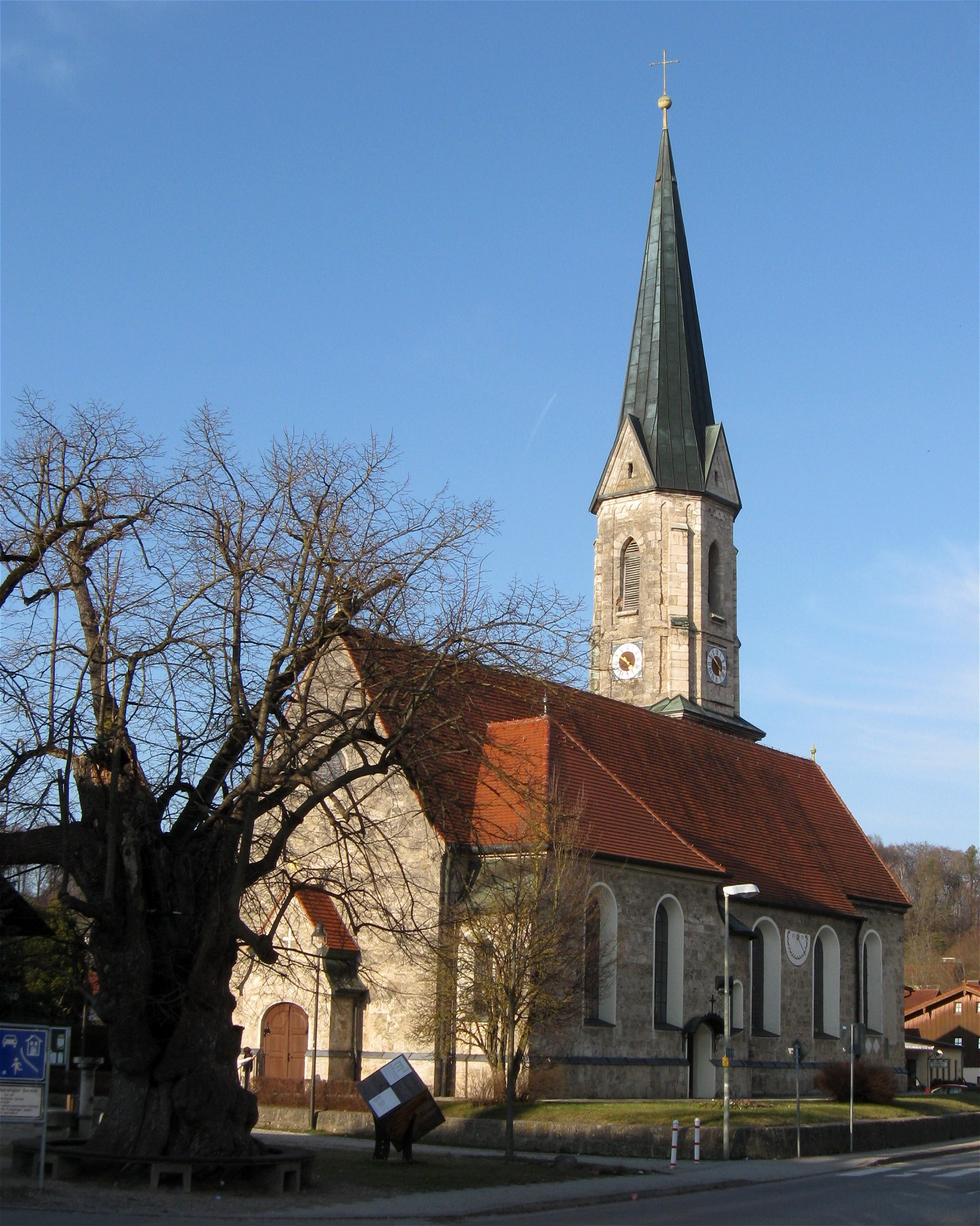 Pfarrkirche St. Georg, Aßling, Lkr. Ebersberg